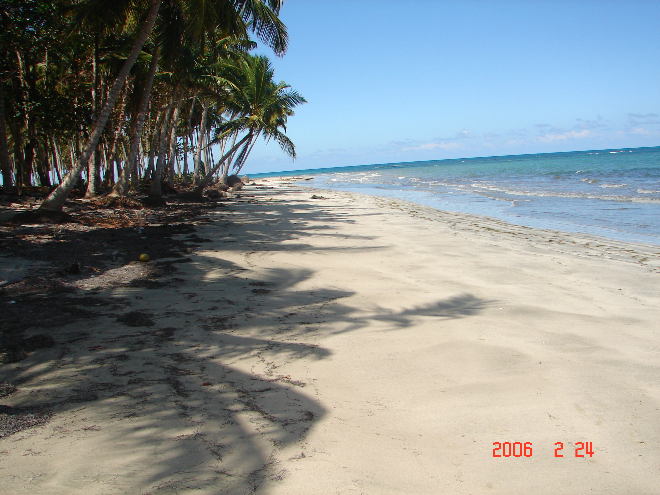 Gaspar Hernández, Espaillat, Dominican Republic